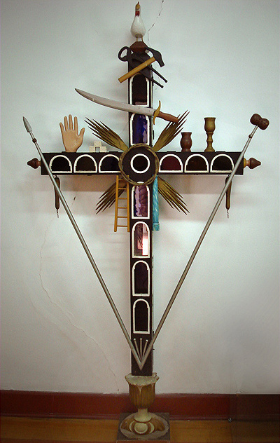 Cruz processional com os símbolos da Paixão de Cristo